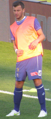 Poli Timisoara's team training before Poli Timisoara - Steaua Bucuresti (0-0)